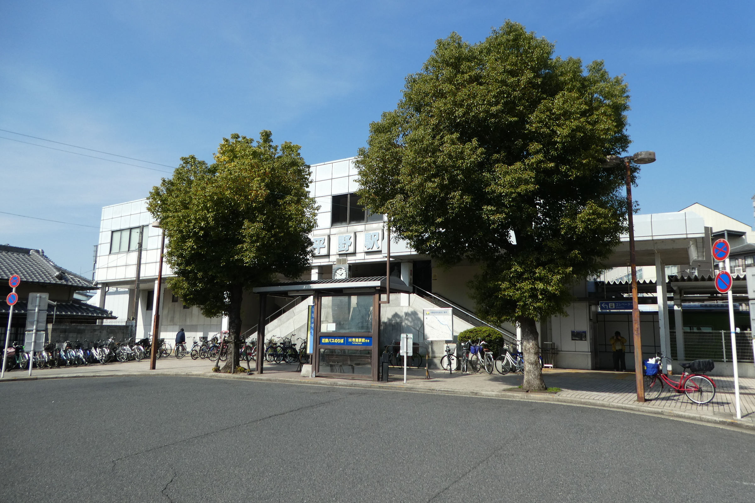 JR西日本大和路線平野駅